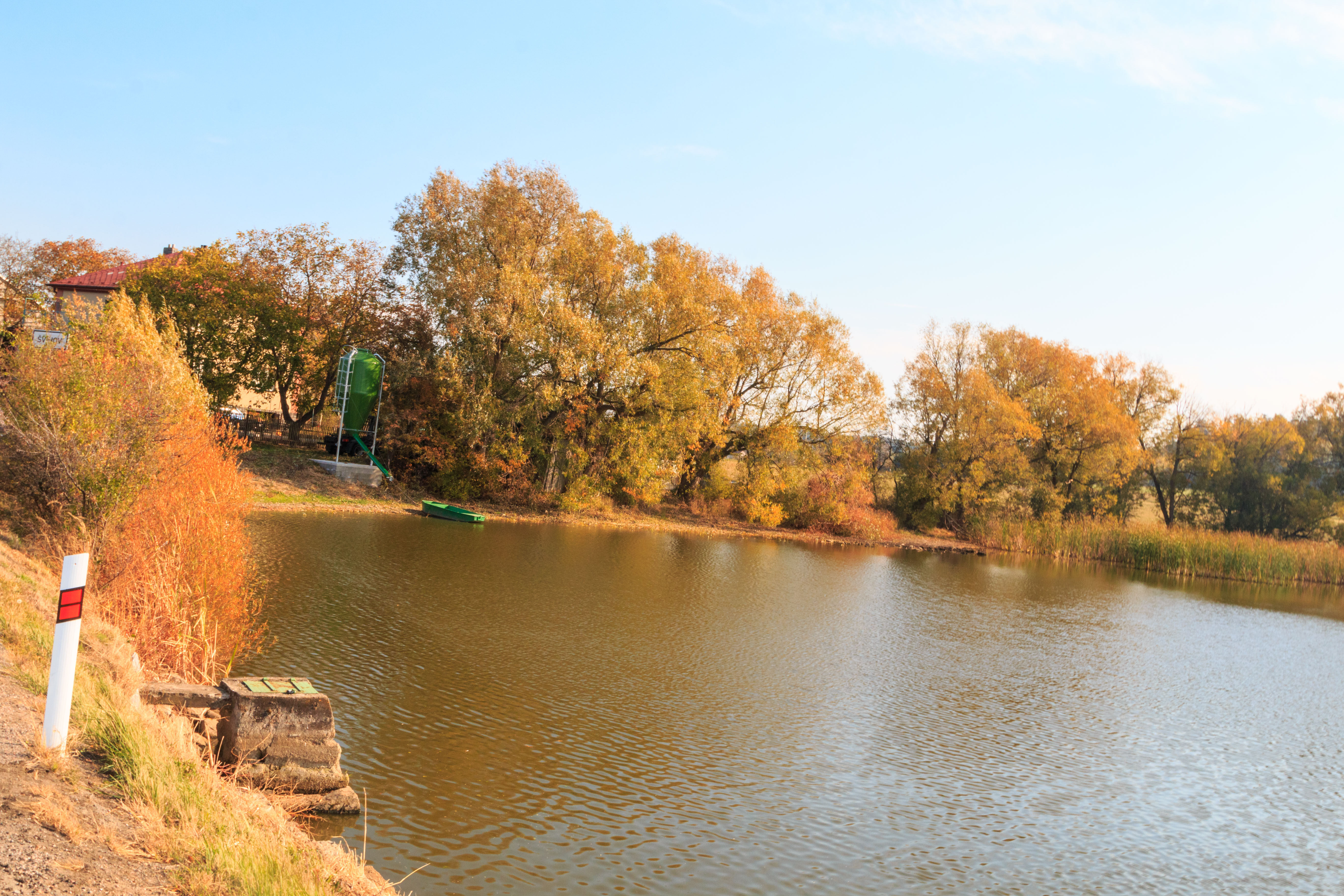 Nový rybník u Švihova Project: Vodstvo. Ticket: 1617.